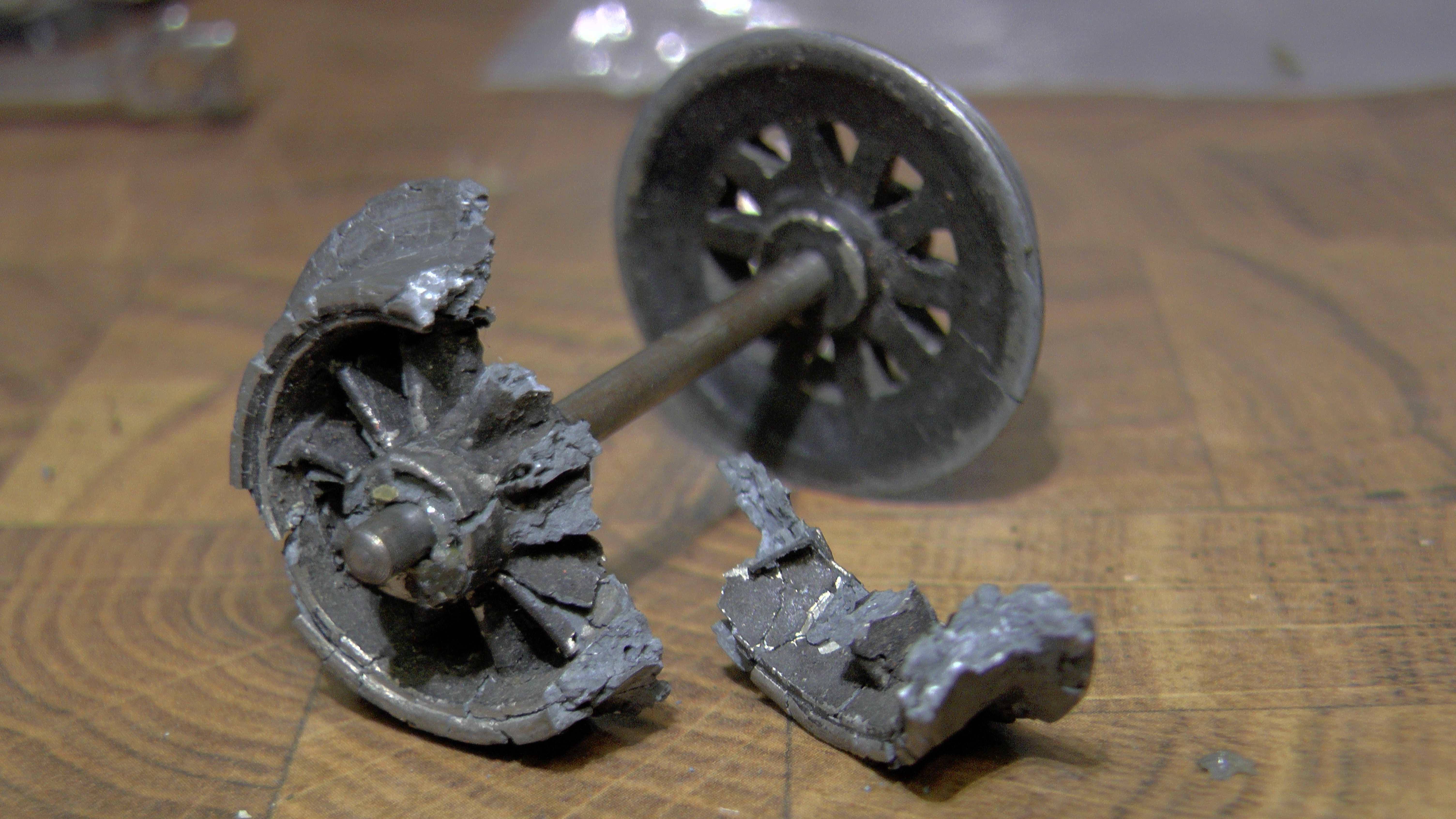 Zinkpest Zinc pest Zamac